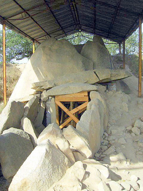 Dolmen and megalithic monument "Anta Grande do Zambujeiro"